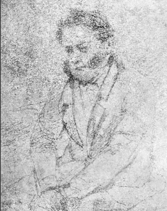 Severin von Jaroszynski in der Armesünderzelle